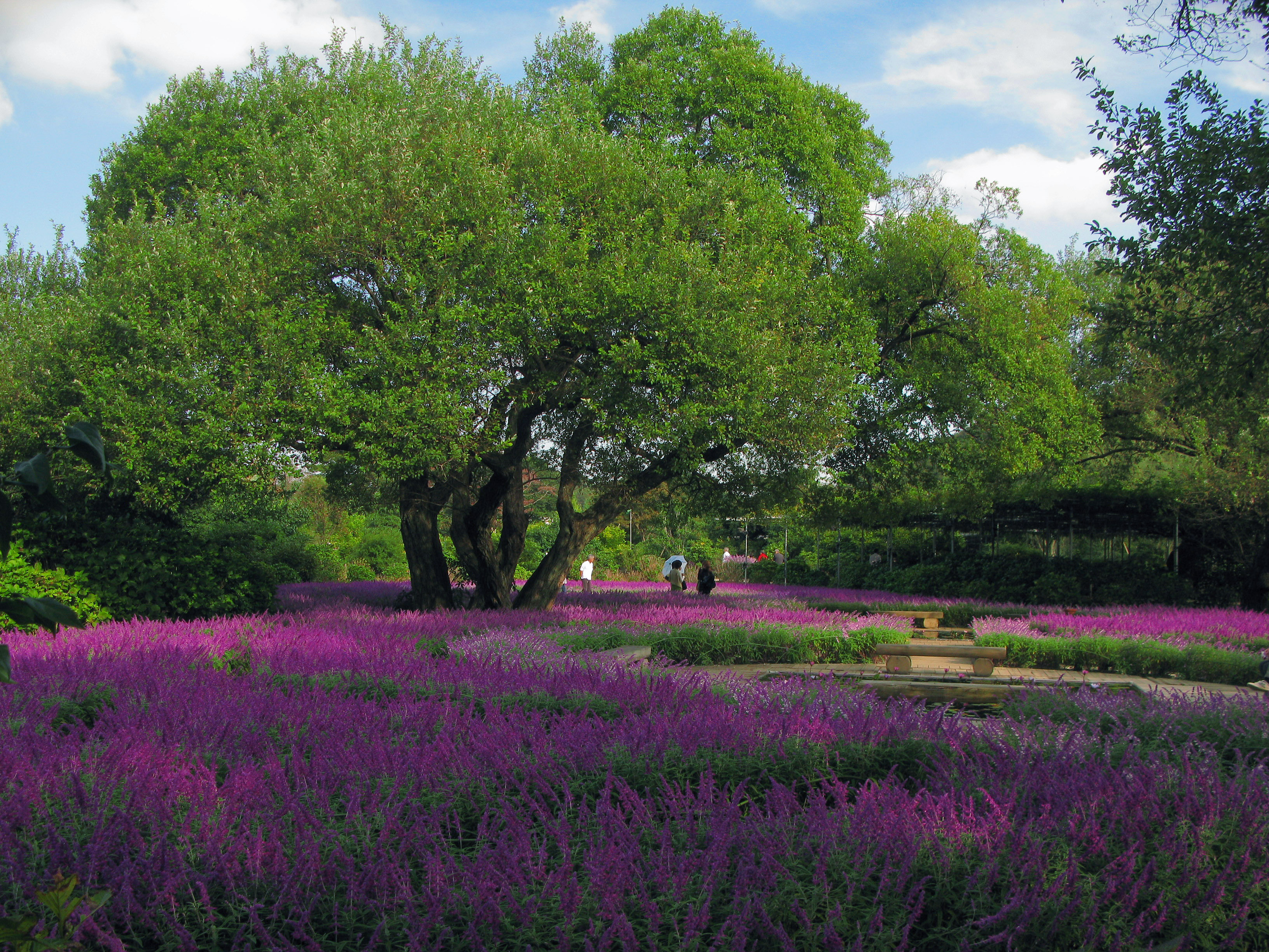 マルバヤナギとアメジストセージ（あしかがフラワーパークにて）（栃木県足利市）